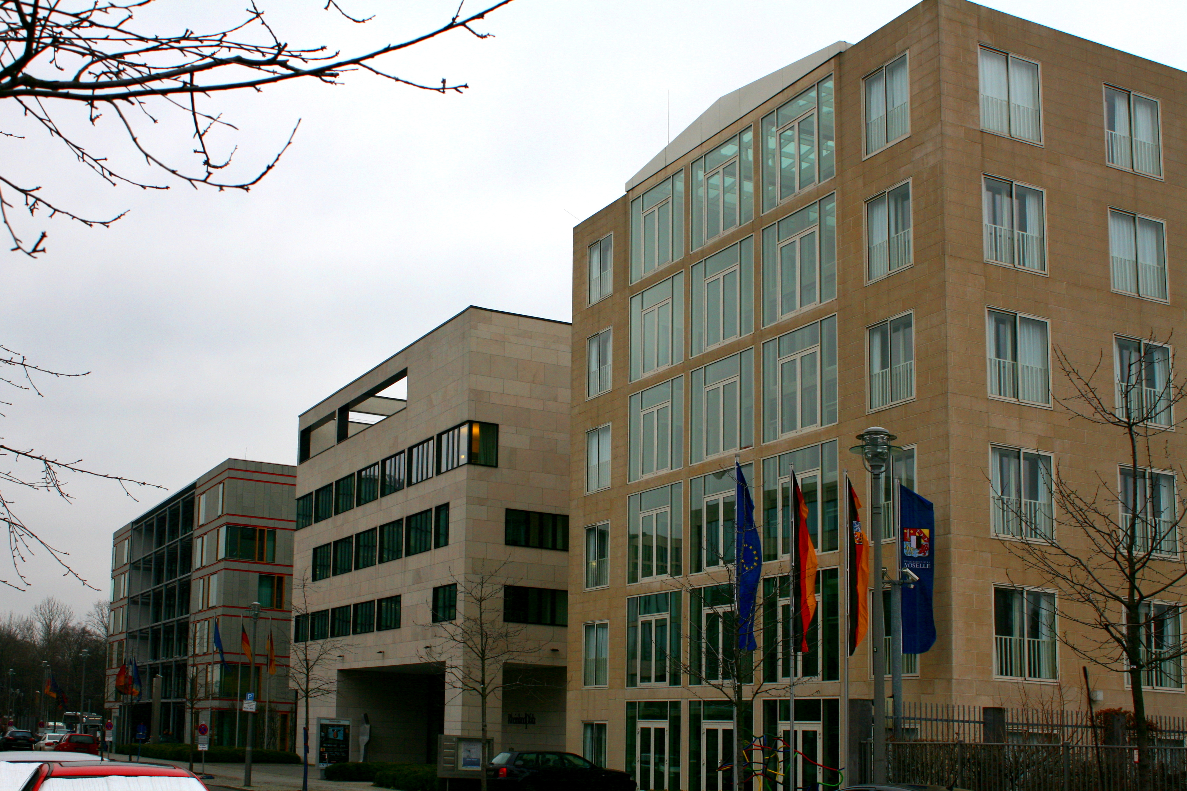 Vertretungen der Länder Saarland (vorne), Rheinland-Pfalz und Niedersachsen/ Schleswig-Holstein (hinten) beim Bund